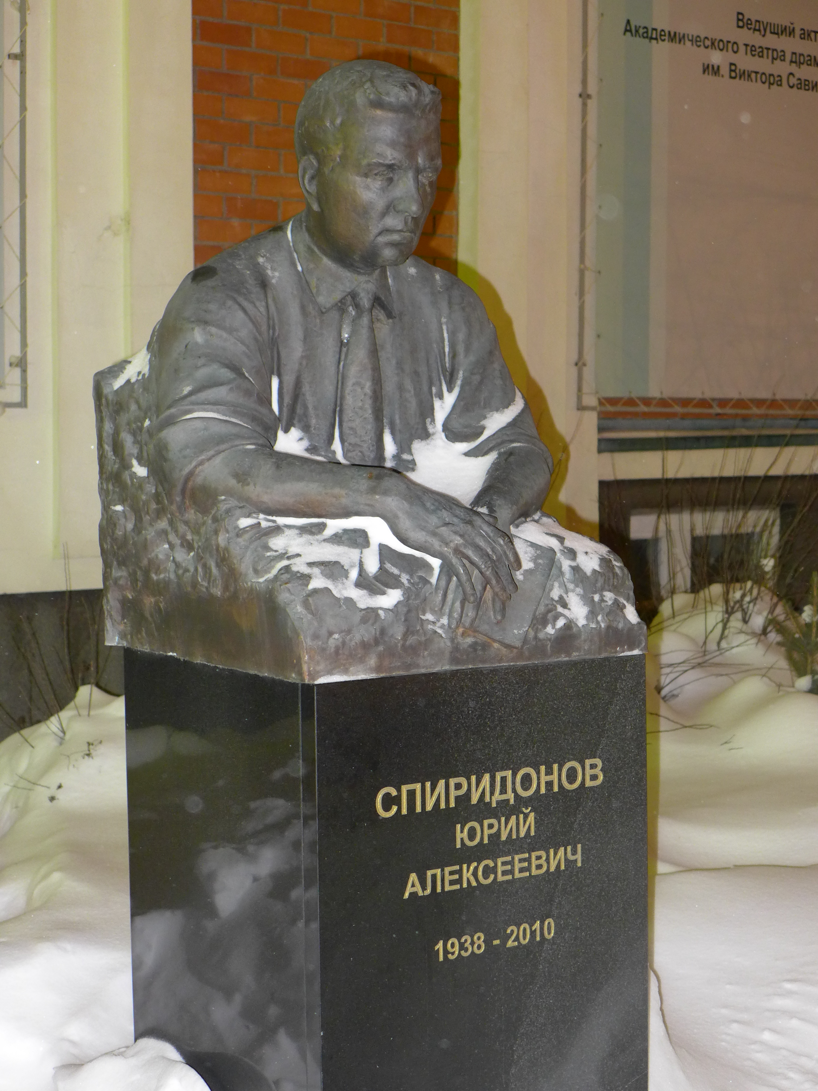 Памятник Юрию Алексеевичу Спиридонову